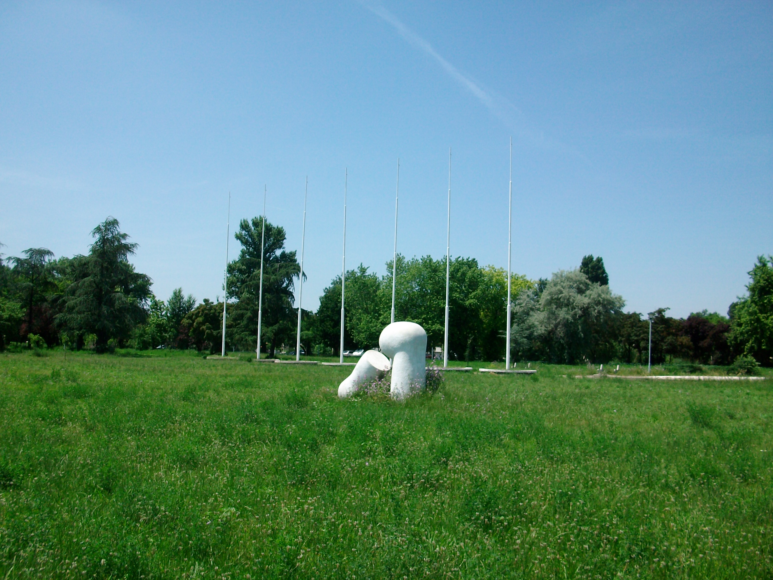 Парк Републике Српске